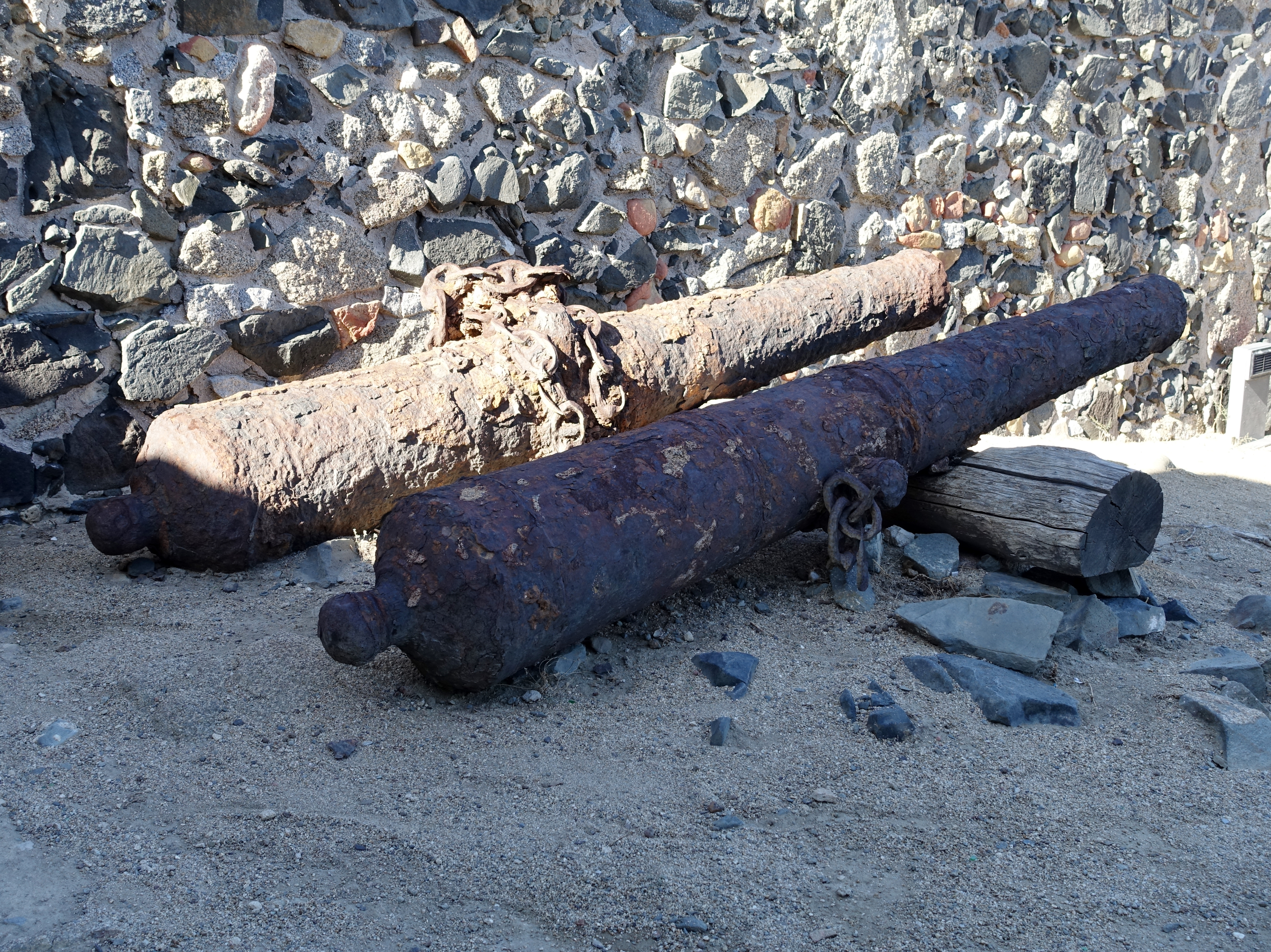 Fortezza Vecchia, Gemeinde Villasimius, Sardinien, Italien